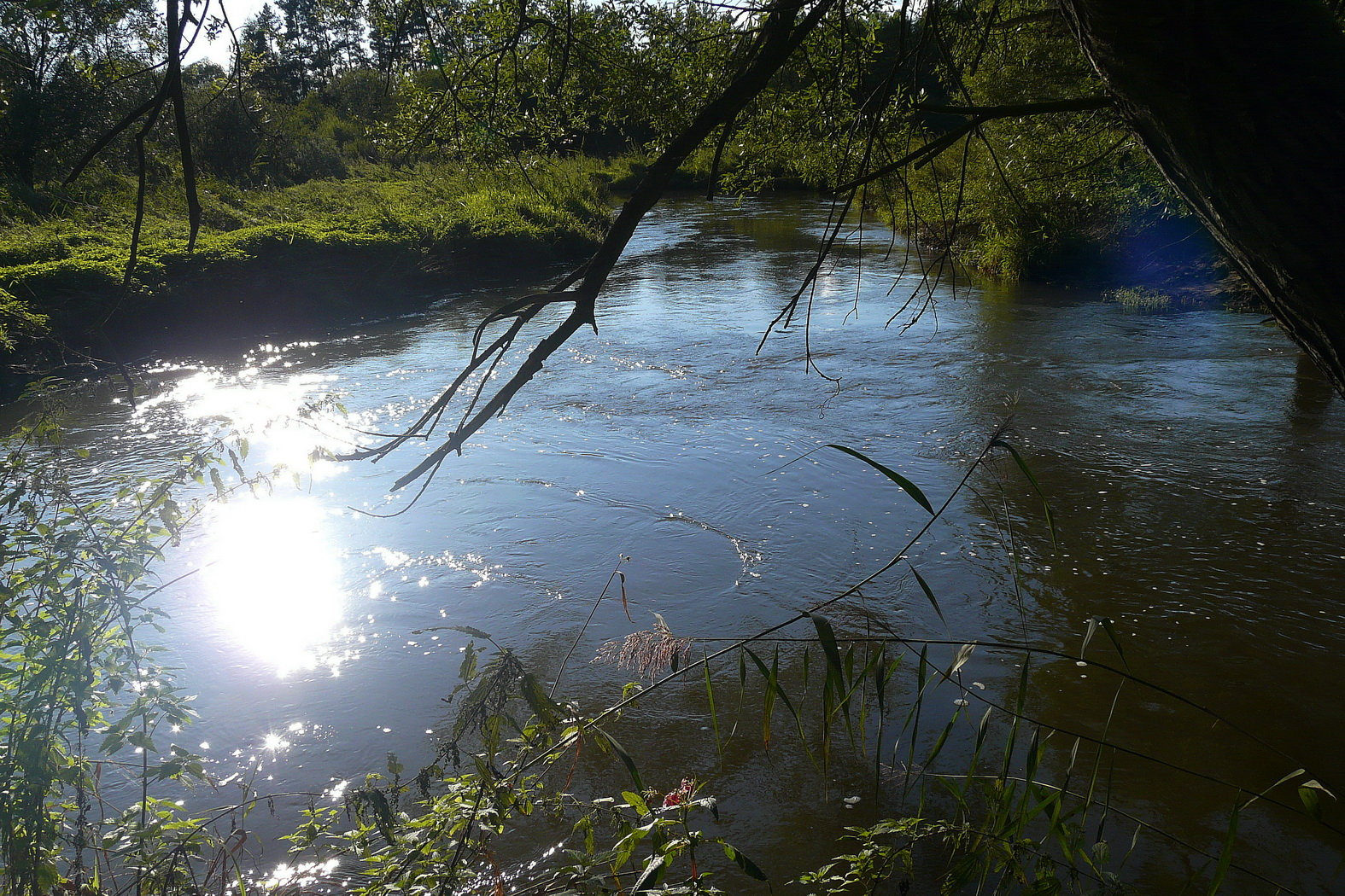 Přírodní památka Meandry Ploučnice u Mimoně